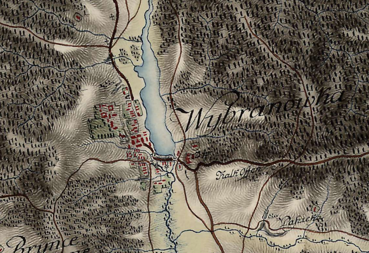 xviii